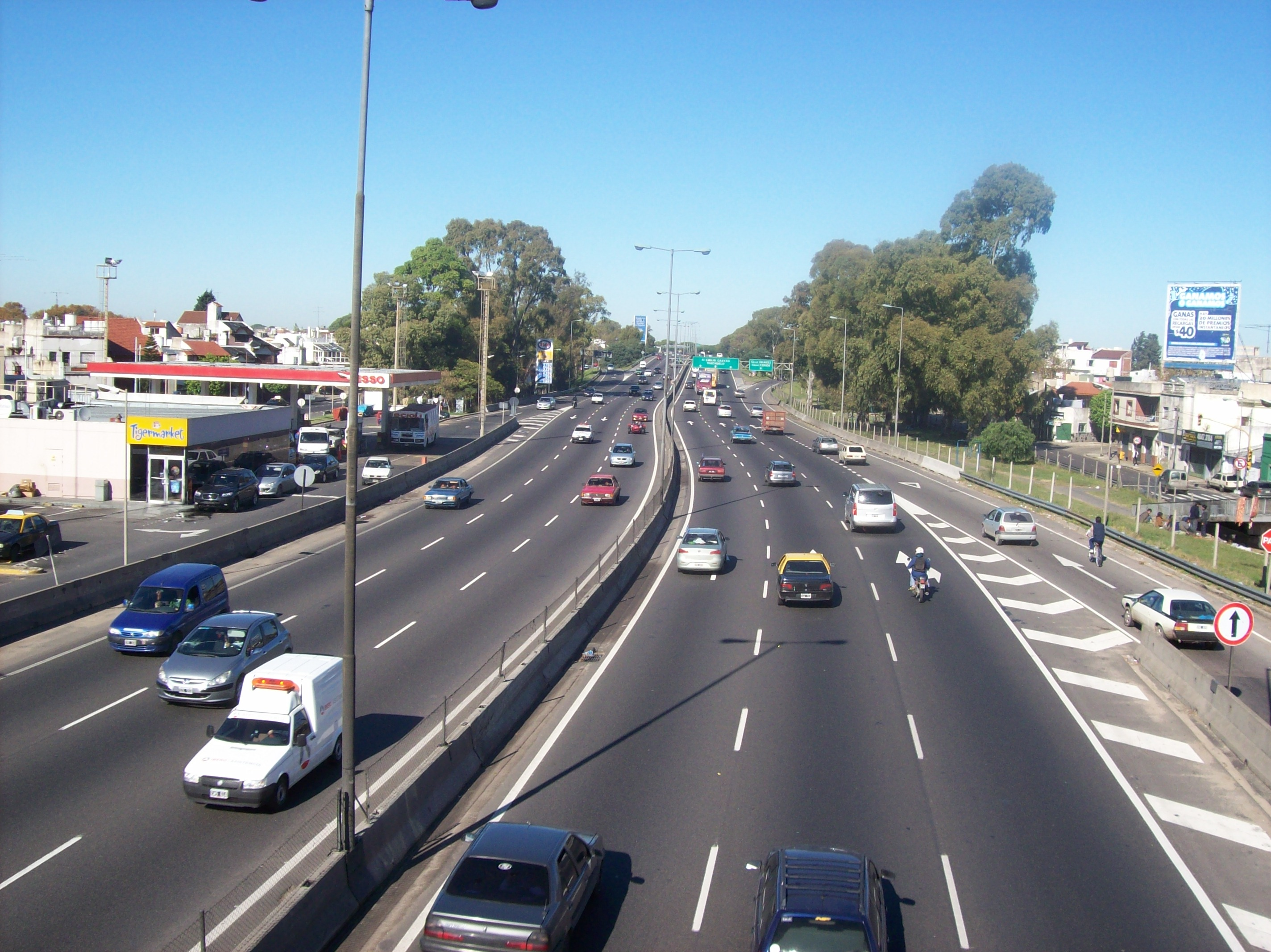 Avenida General Paz km 15 en el barrio de Liniers, Ciudad de Buenos Aires, Argentina.